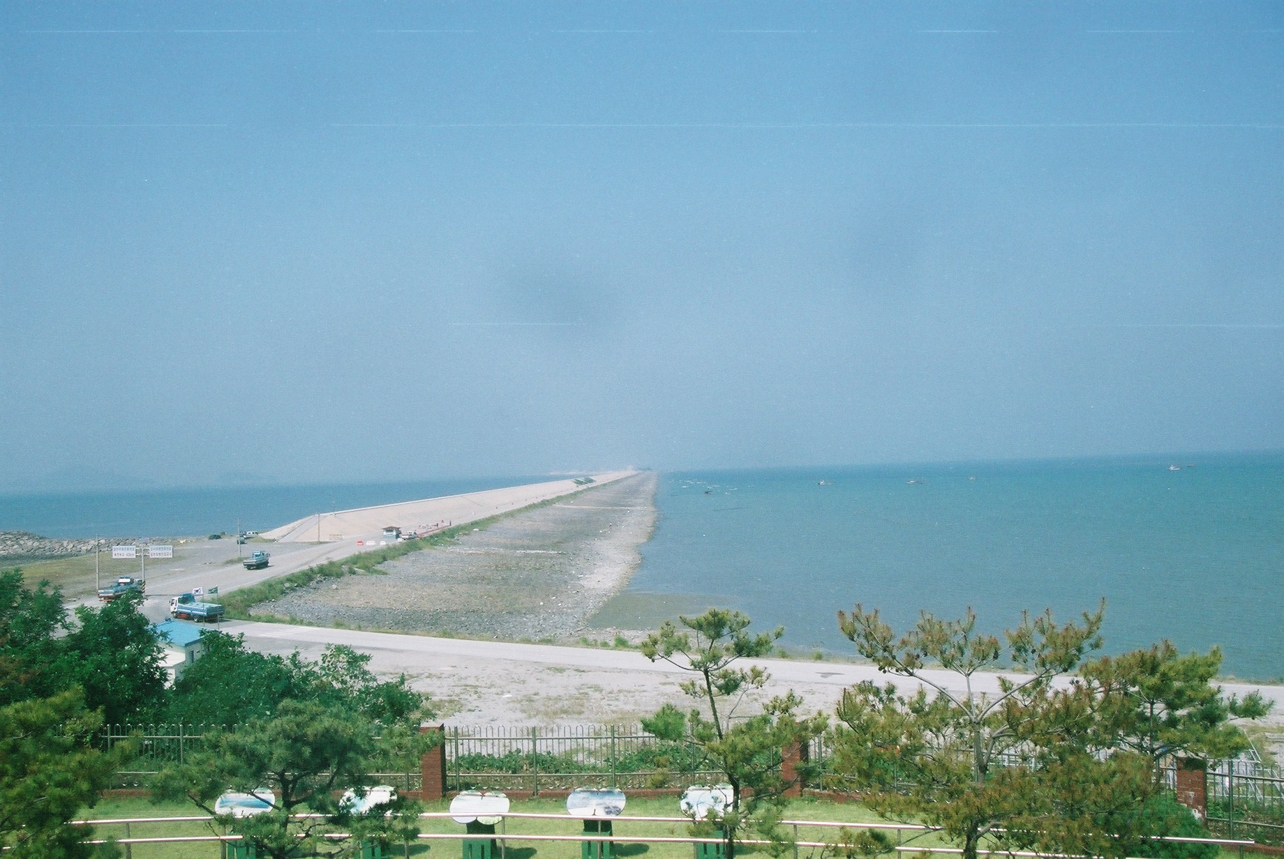 The Saemangeum seawall. see also: Wikipedia:Saemangeum In Buangun, Jeolla-bukdo, South Korea.